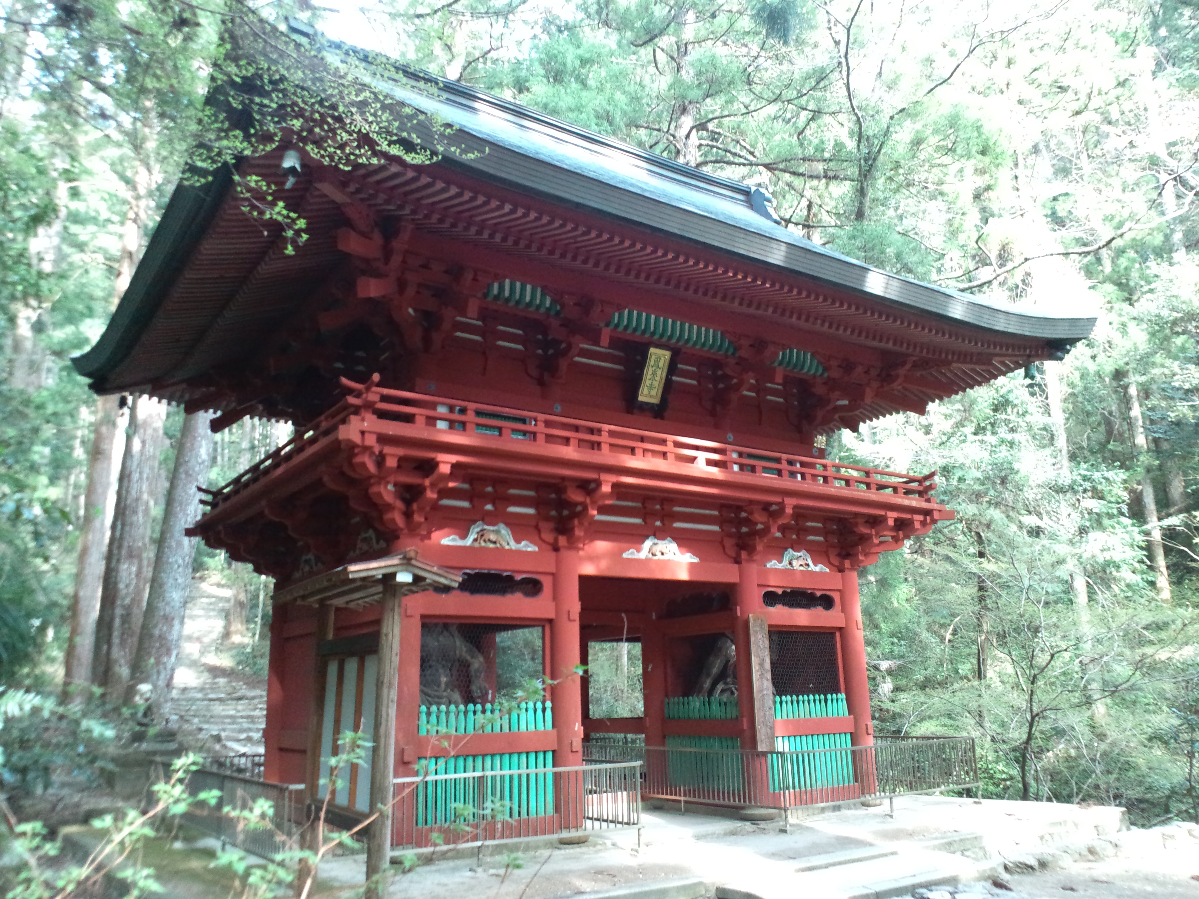 鳳来寺山 鳳来寺仁王門